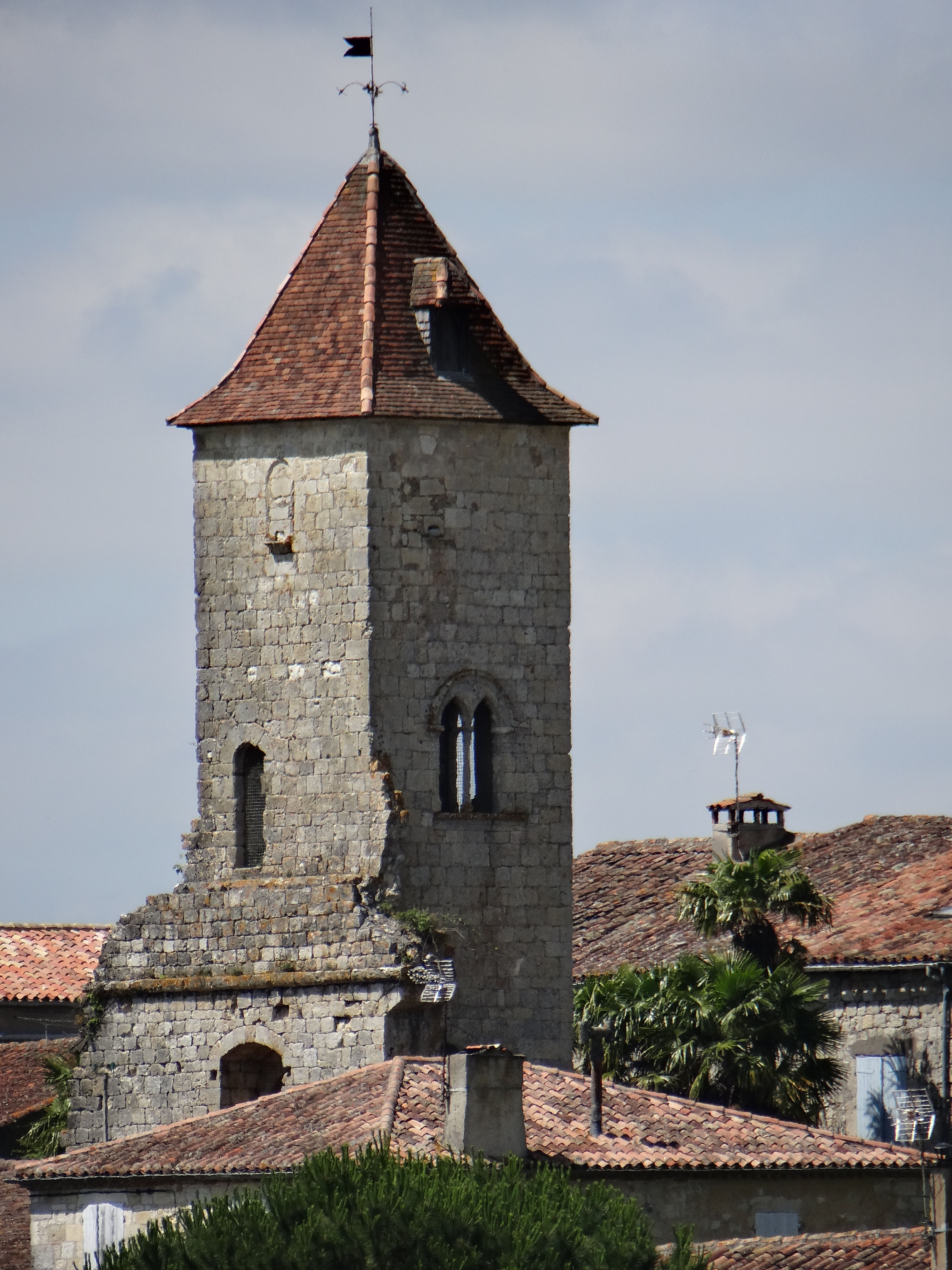 La Romieu - Palais du cardinal d'Aux - Tour du Cardinal d'Aux, dernier vestige du palais